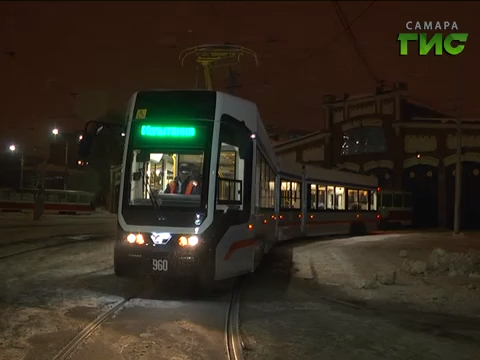 Трамвай 71-633 в Самаре на испытаниях